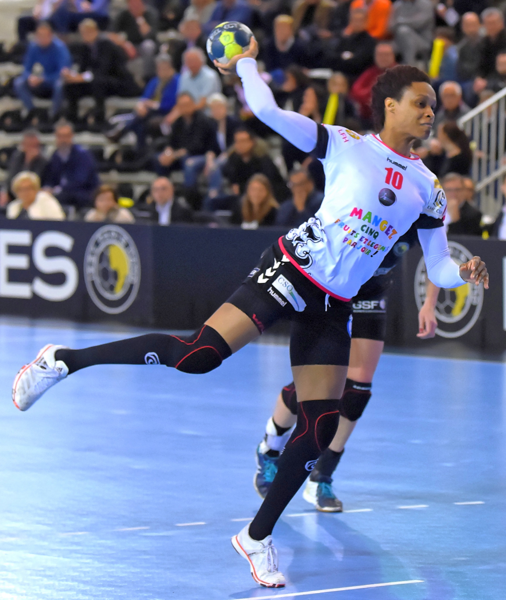 Rencontre de demie-finale de coupe de France entre Issy Paris et Brest. A Issy les Moulineaux, le 26 avril 2017.